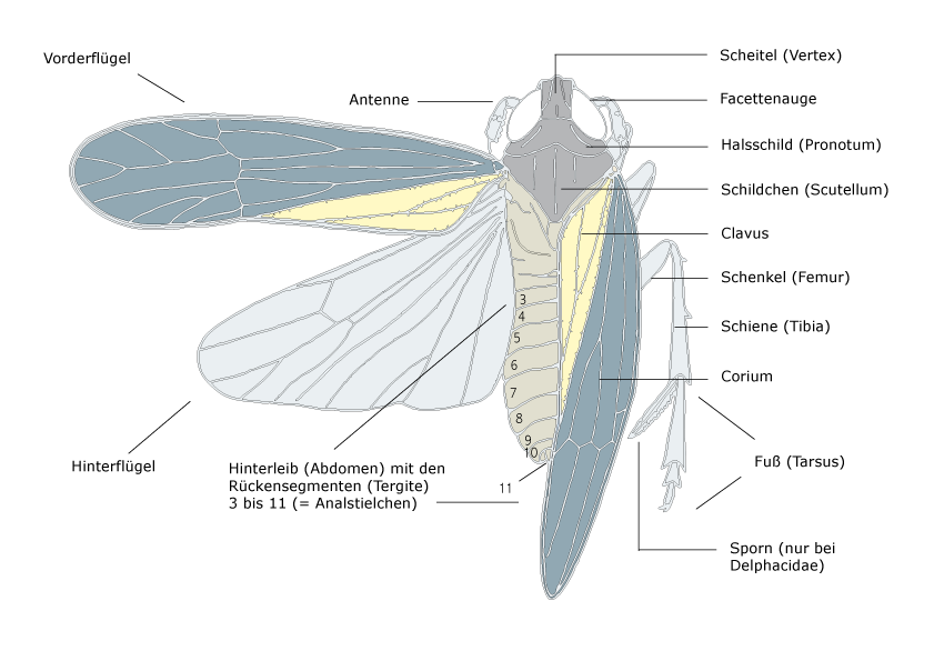 Schemazeichnung: Grundbauplan der Spitzkopfzikaden (Fulgoromorpha)